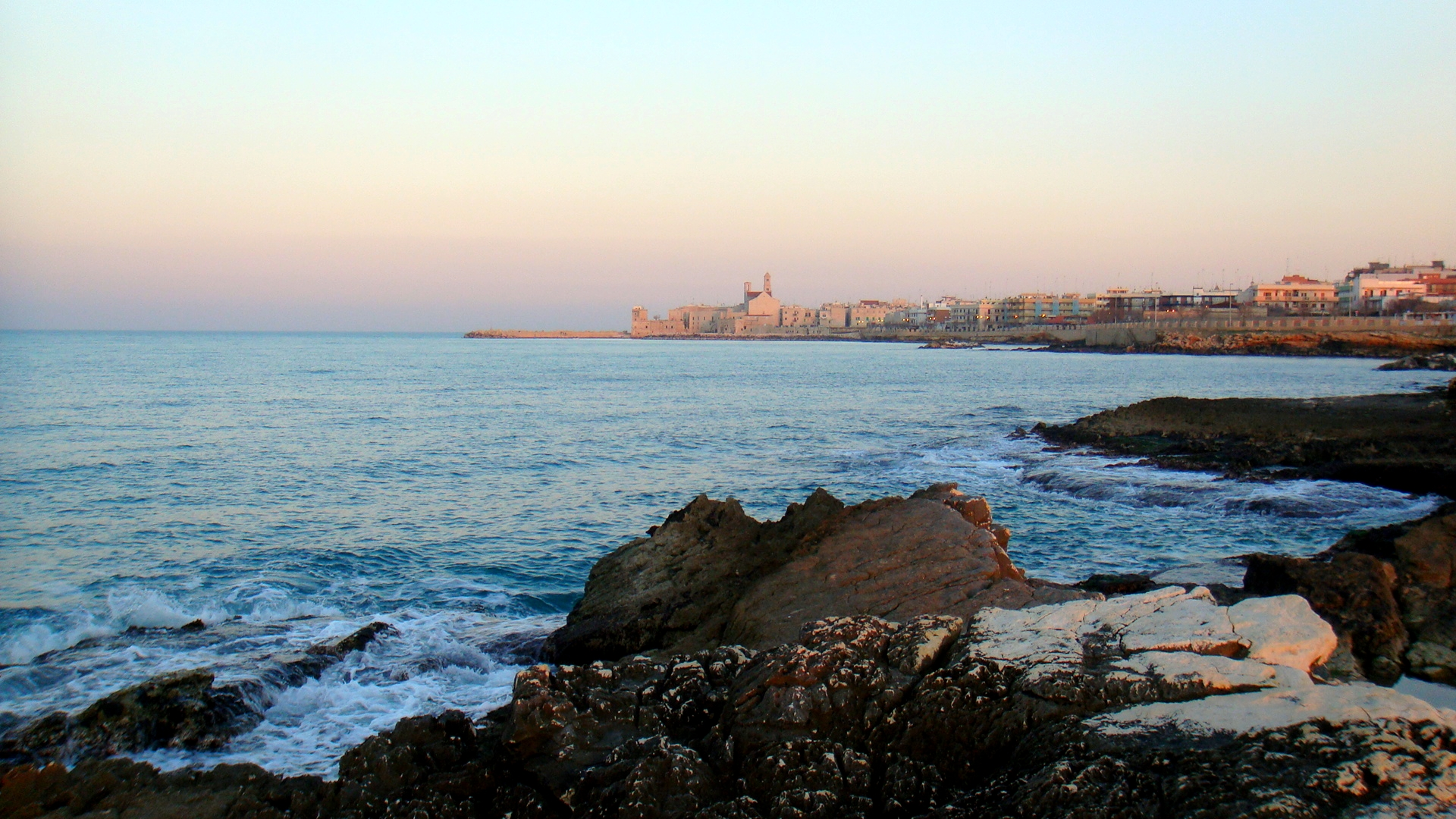 Giovinazzo, vista dai "monaci"